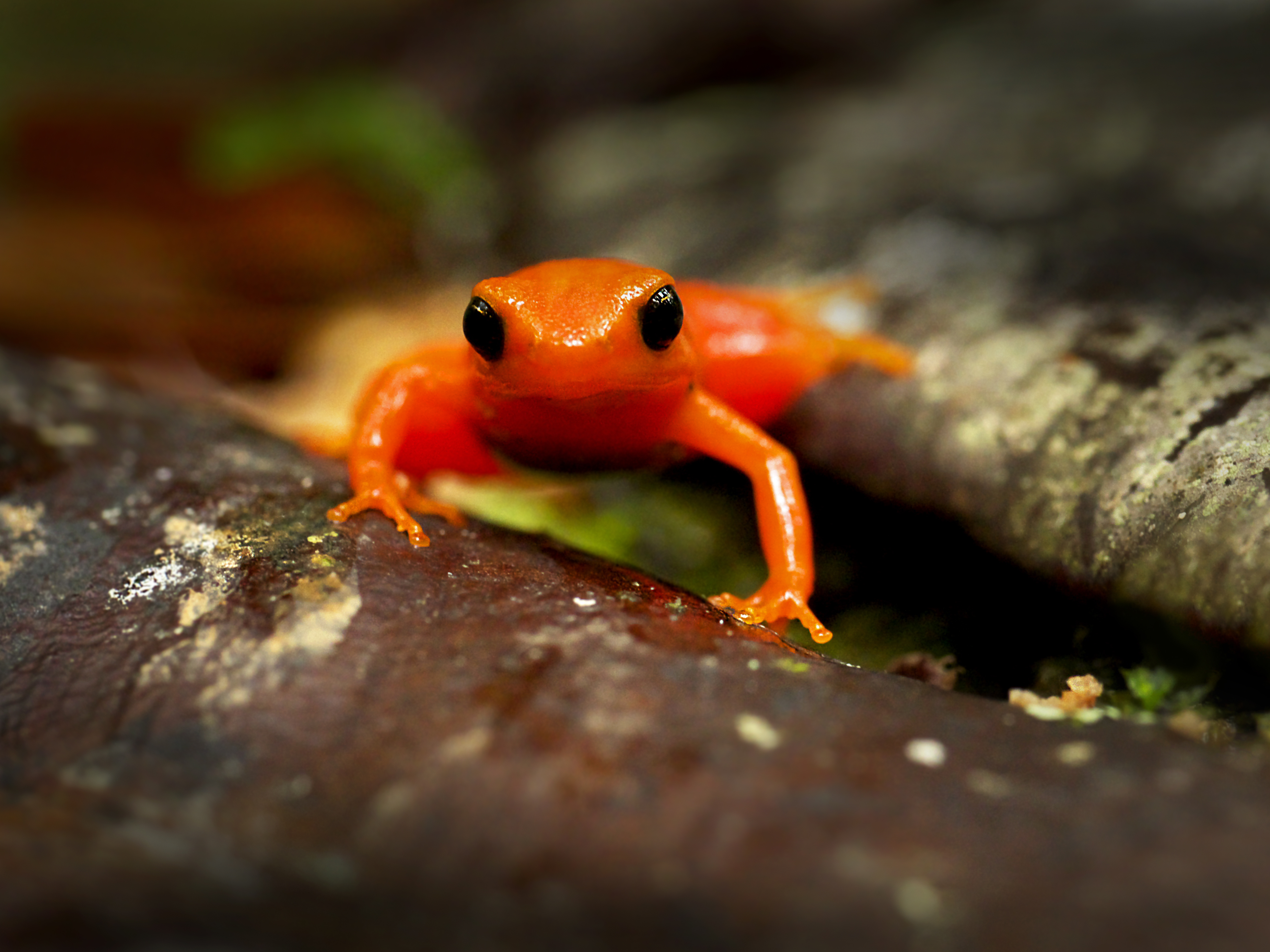 Panasonic GX7 + Leica DG Macro-Elmarit 45mm F2.8 ASPH OIS